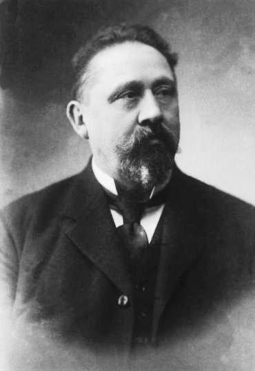 hu/Alpár Ignác (1855–1928) építész portréja. 1905 körül készült fénykép